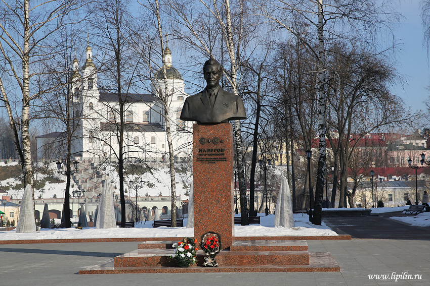 Віцебск.